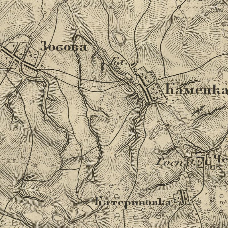 Деревня Каменки Волоколамского района Московской области России на карте Ф. Ф. Шуберта Московской губернии